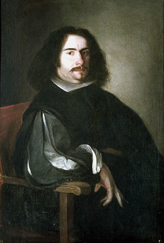 Retrato del dramaturgo español Agustín Moreto y Cavana (1618-1669).